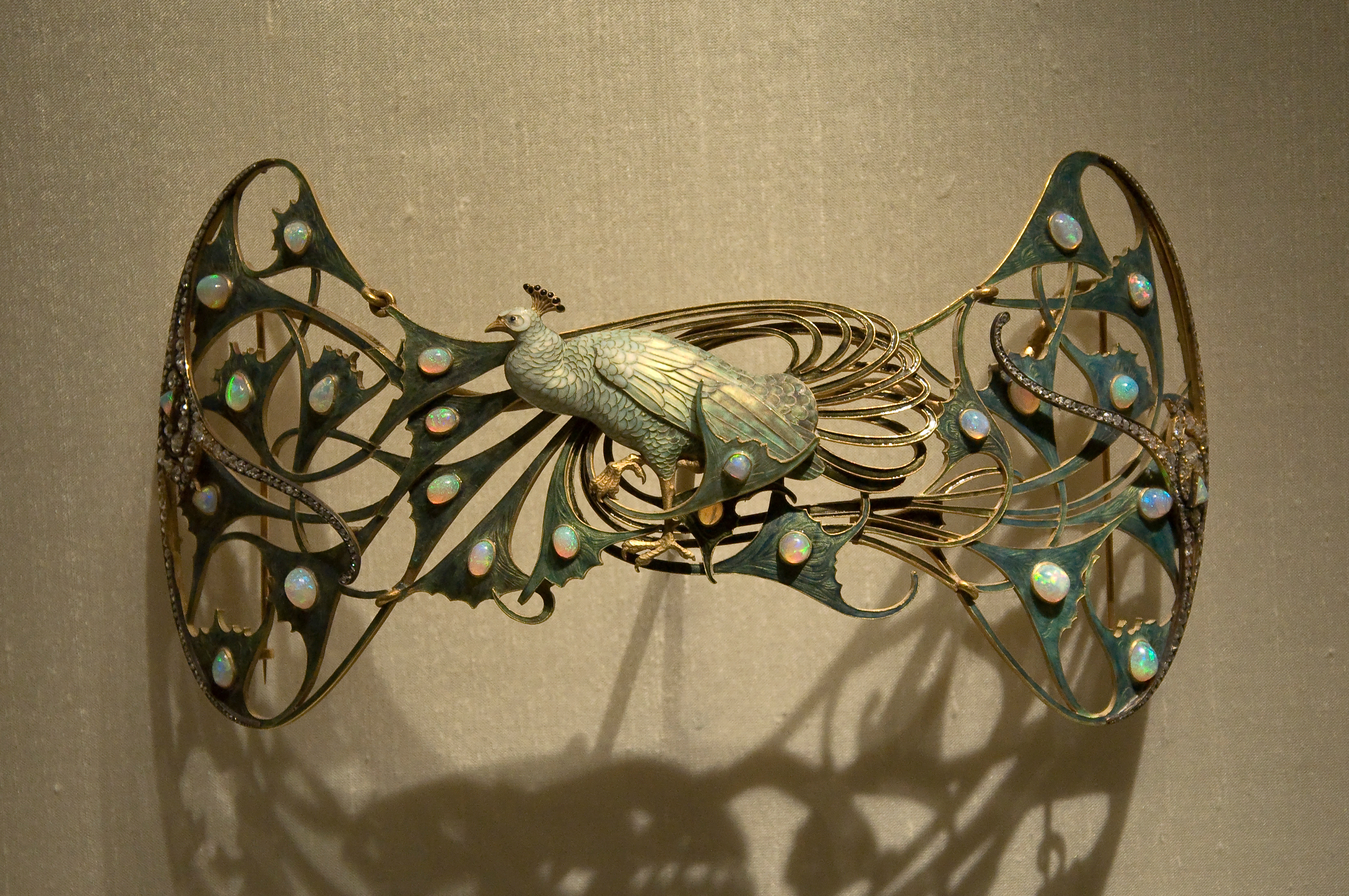 Broche van René Lalique in het museum Calouste Gulbenkian in Lissabon